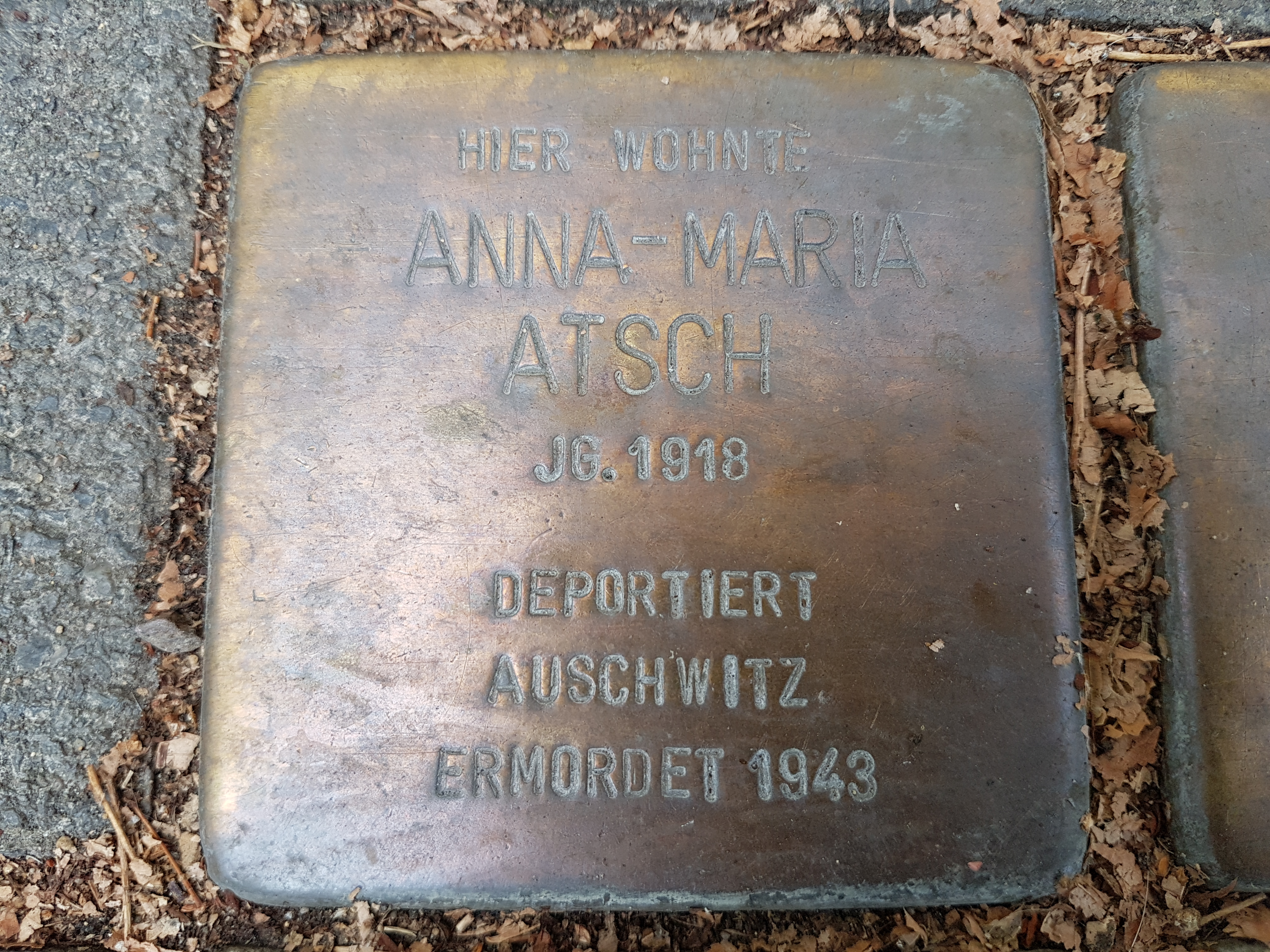 Stolperstein Duisburg Anna-Maria Atsch